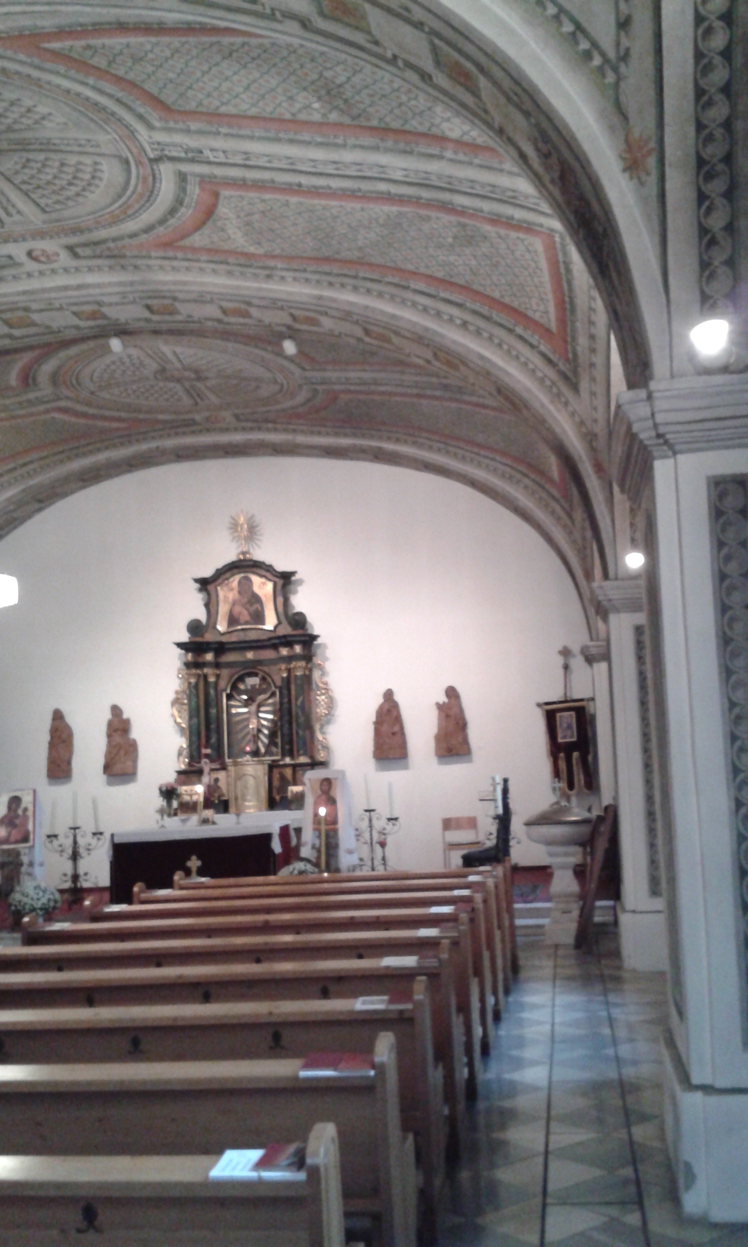 Altkath. Markuskirche Klagenfurt, Kircheninnenraum